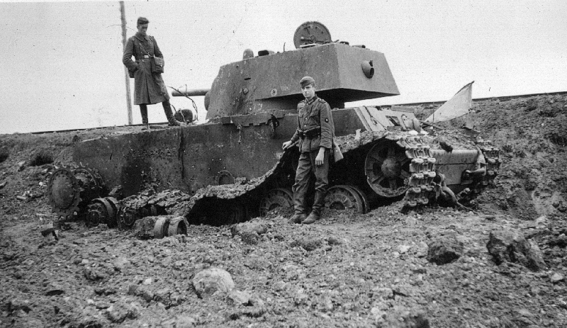 Zerstörter russischer Panzer KW-1 nach den Kämpfen bei Kowno